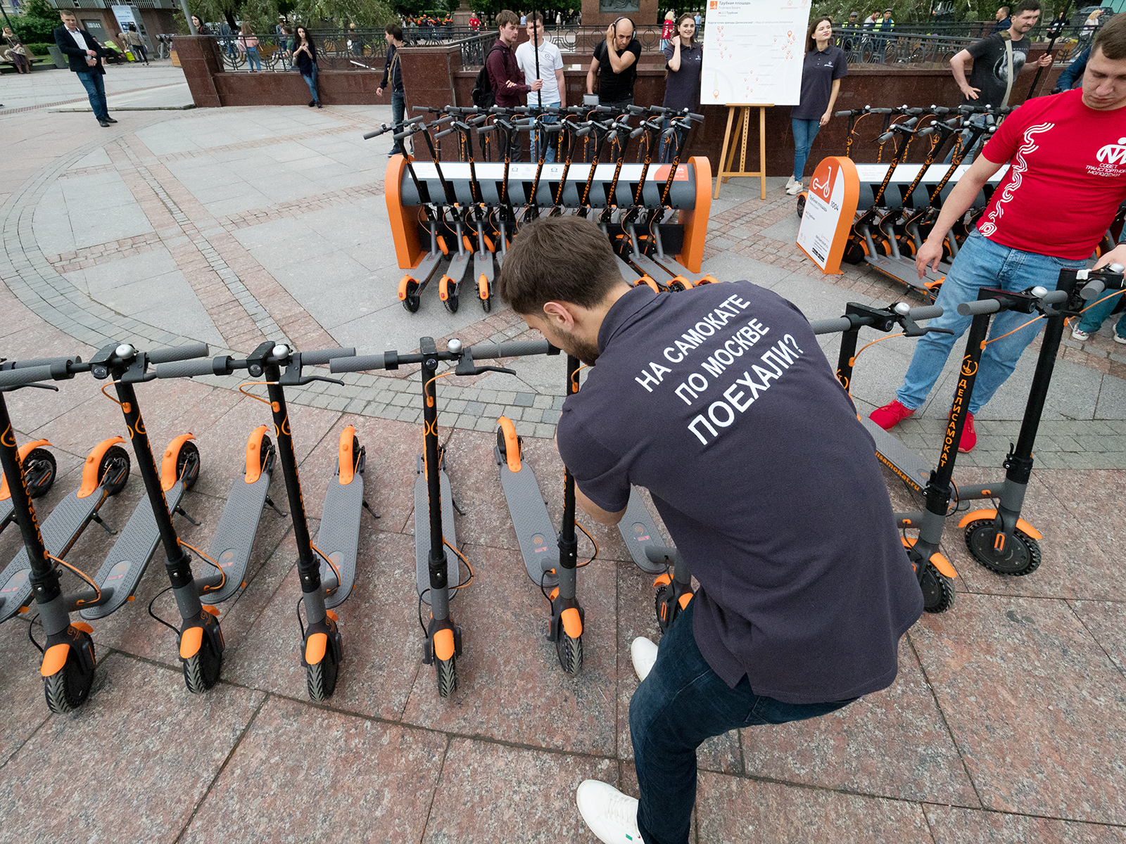 Делисамокат -- прокат электросамокатов в Москве